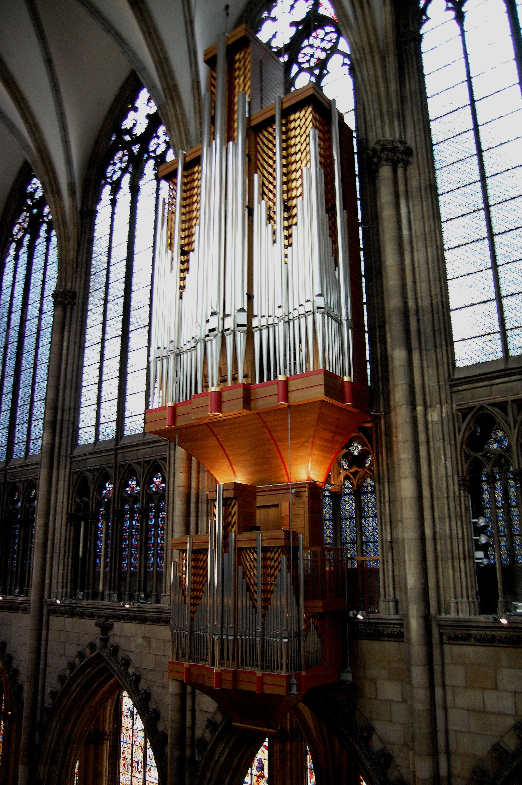 Schwalbennestorgel Köner Dom